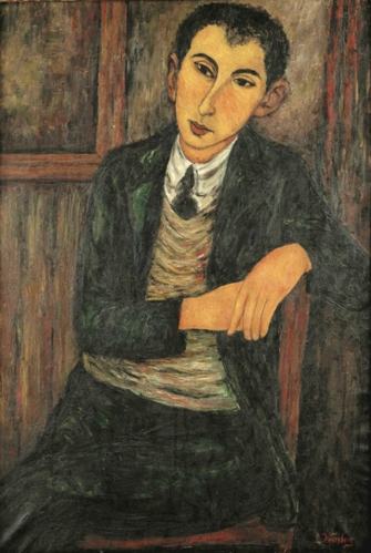 Tableau Le jeune peintre Aron Haber Beron, de Léon Weissberg